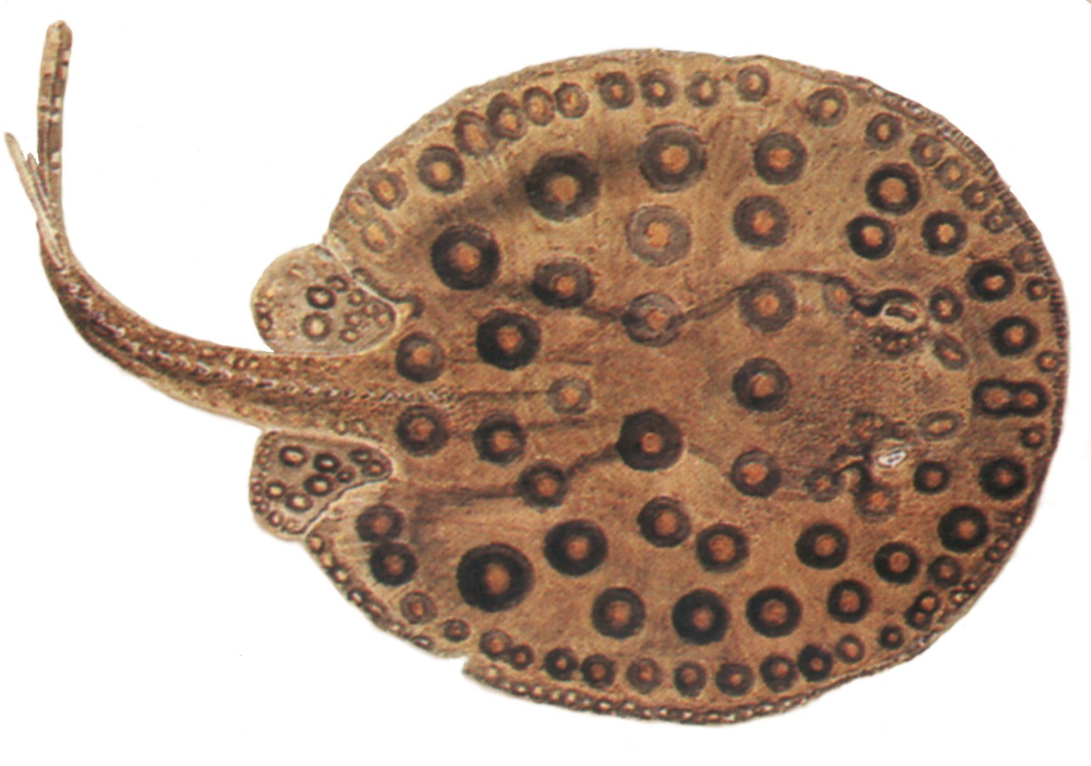 Desenho de uma arraia-grande (Paratrygon motoro), por Johann Natterer, parte da missão ao Brasil de naturalistas do imperador austríaco Francisco I, de 1817 a 1835 }